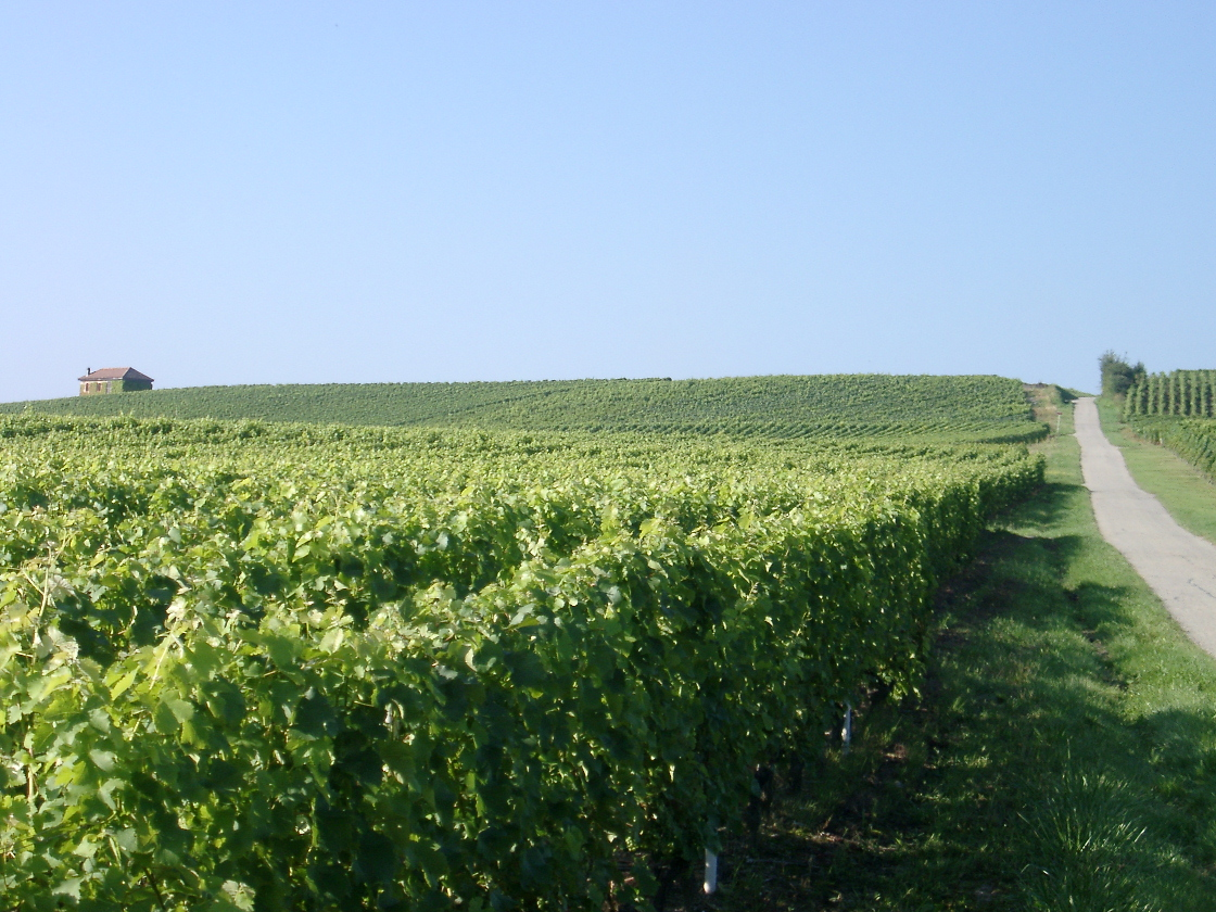 Une partie du Vignoble de Dardagny dans le canton de Genève en Suisse Romande.